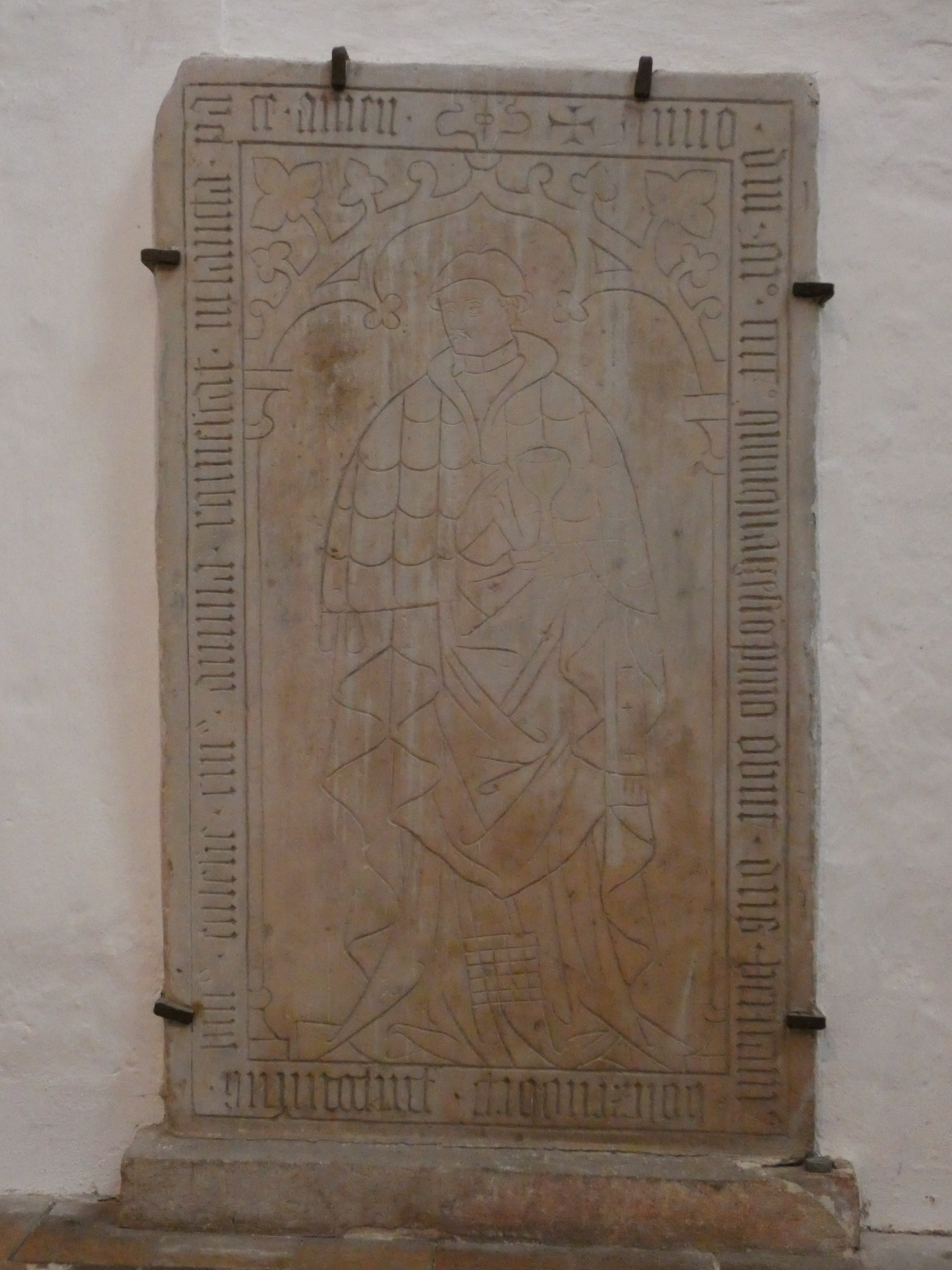 Grabplatte Bertram von Holtzendorf, Dom zu Brandenburg